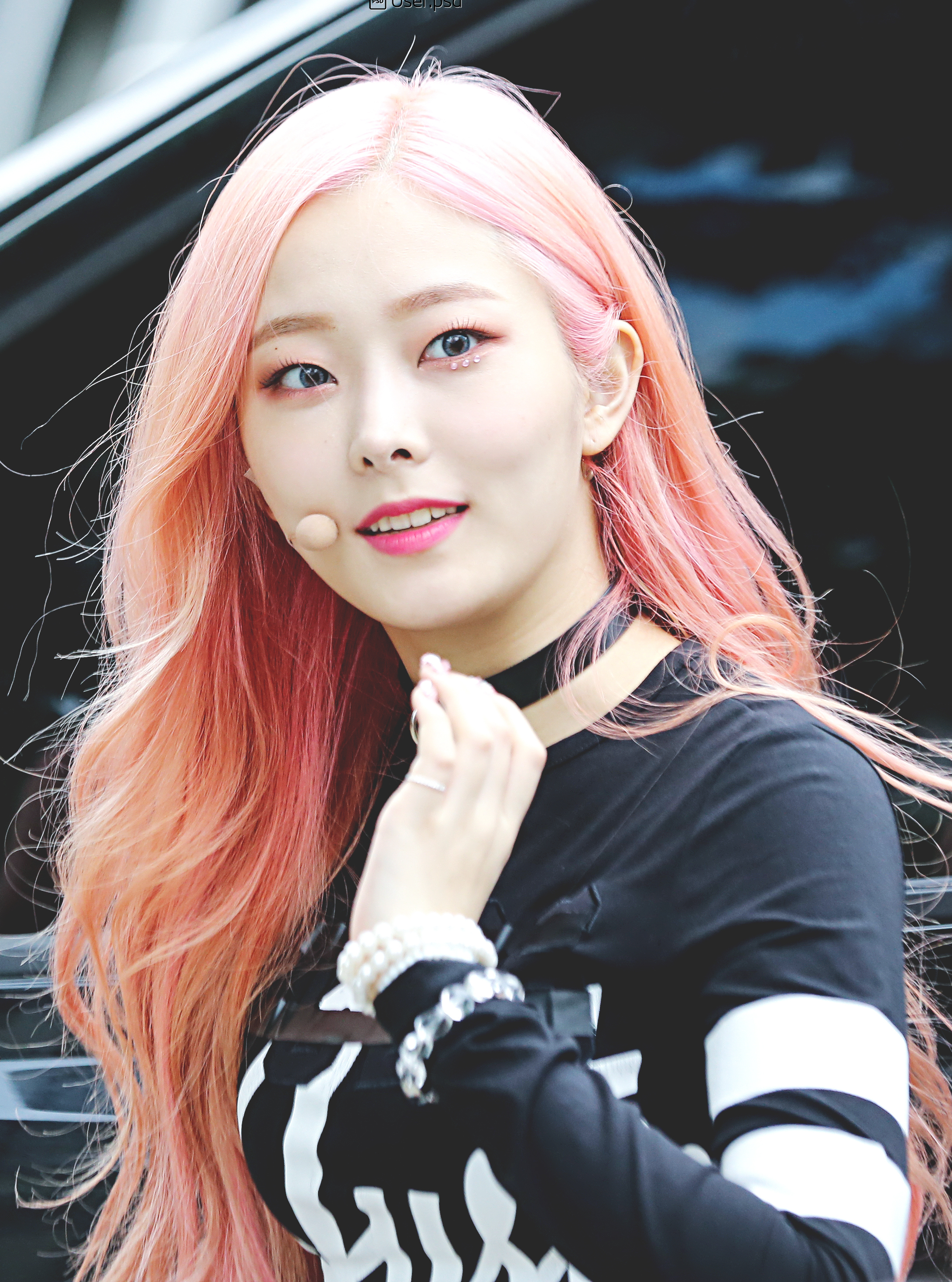 180529 프리스틴V